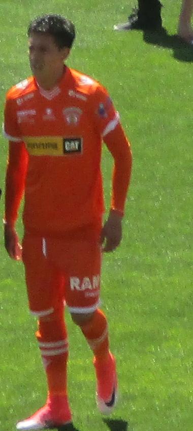 Pablo Parra vistiendo la camiseta de Cobreloa en el año 2017